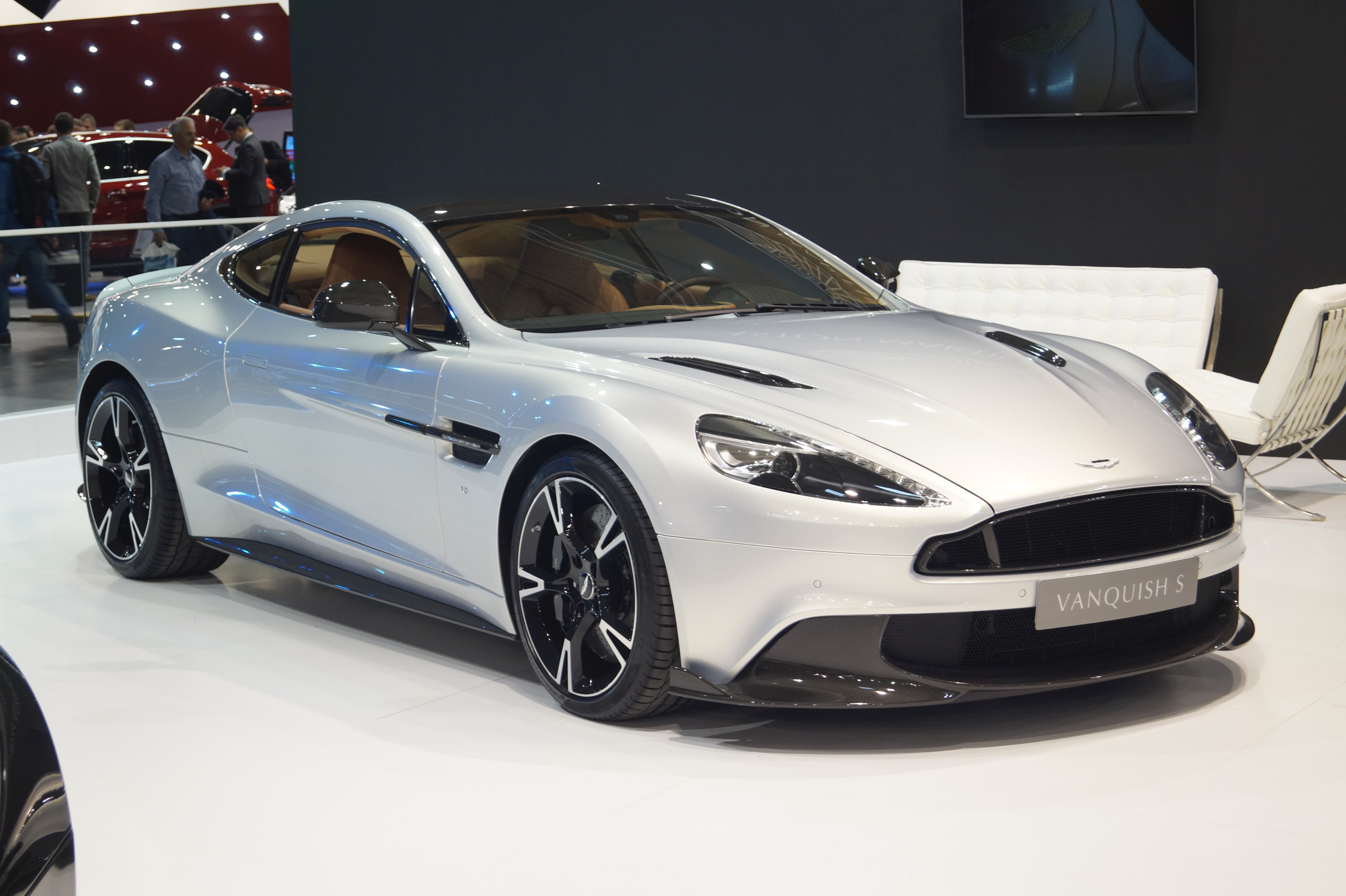 Prawy przód Aston Martina Vanquish S na Motor Show Poznań 2017.